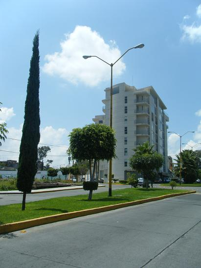 Edificio Palmeiras de Moroleon